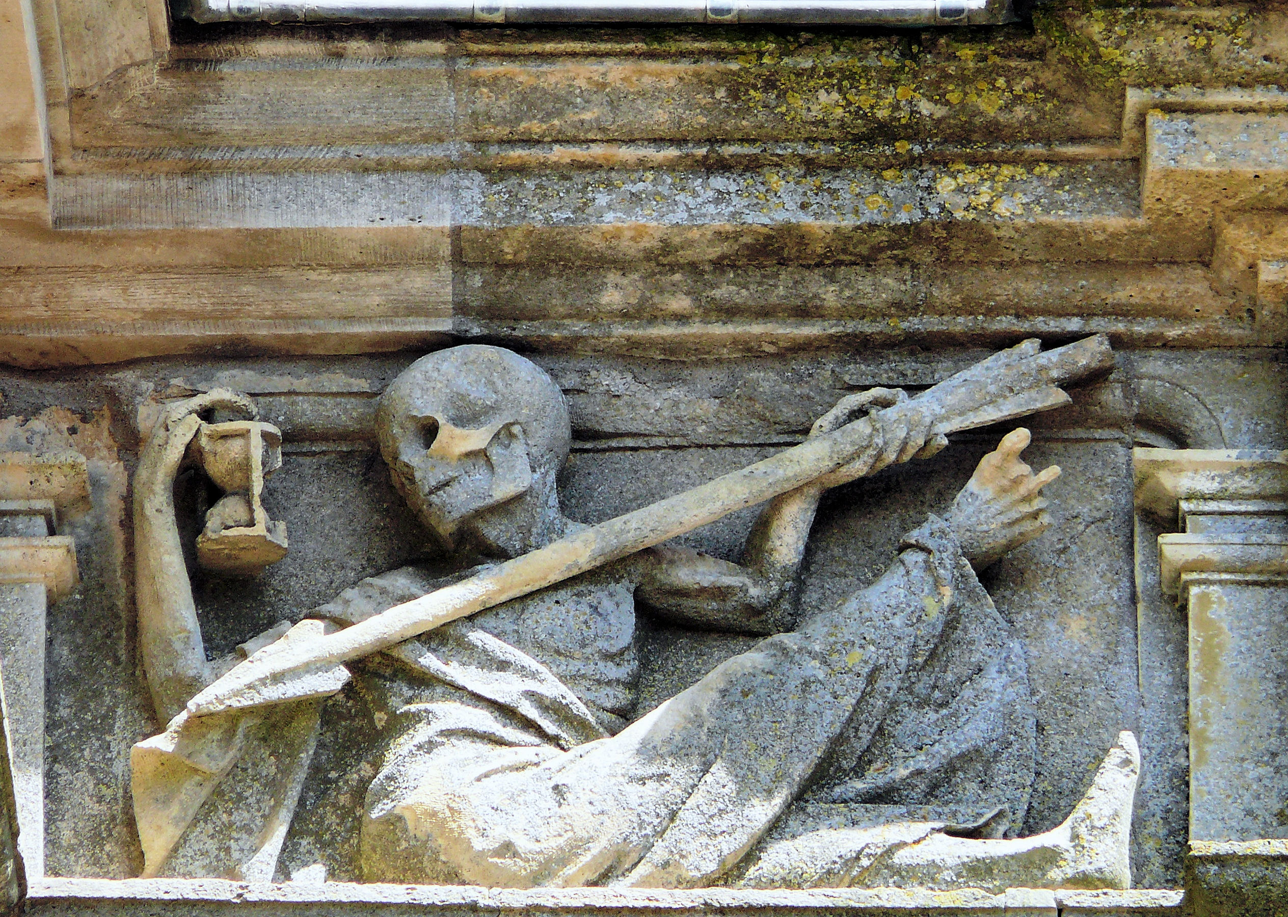 Rembercourt-Sommaisne - Façade occidentale - Détail